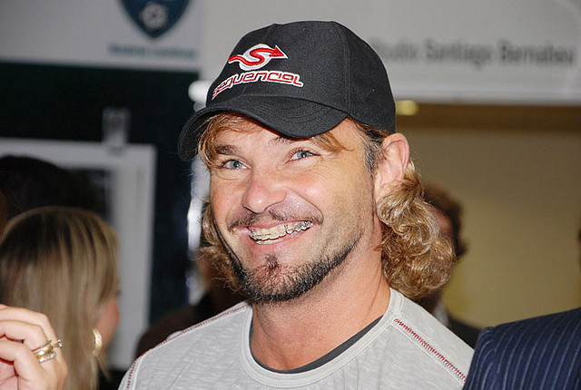 Mateus Carrieri em 2010.